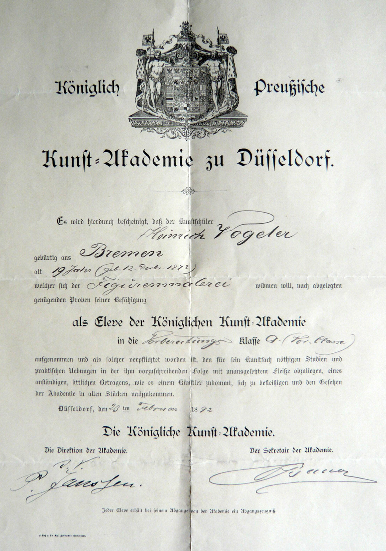 Dokument der Kunstakademie Düsseldorf, Aufnahme Heinrich Vogeler am 23. Februar 1892 (Ausschnitt) unter Direktor Johann Peter Theodor Janssen